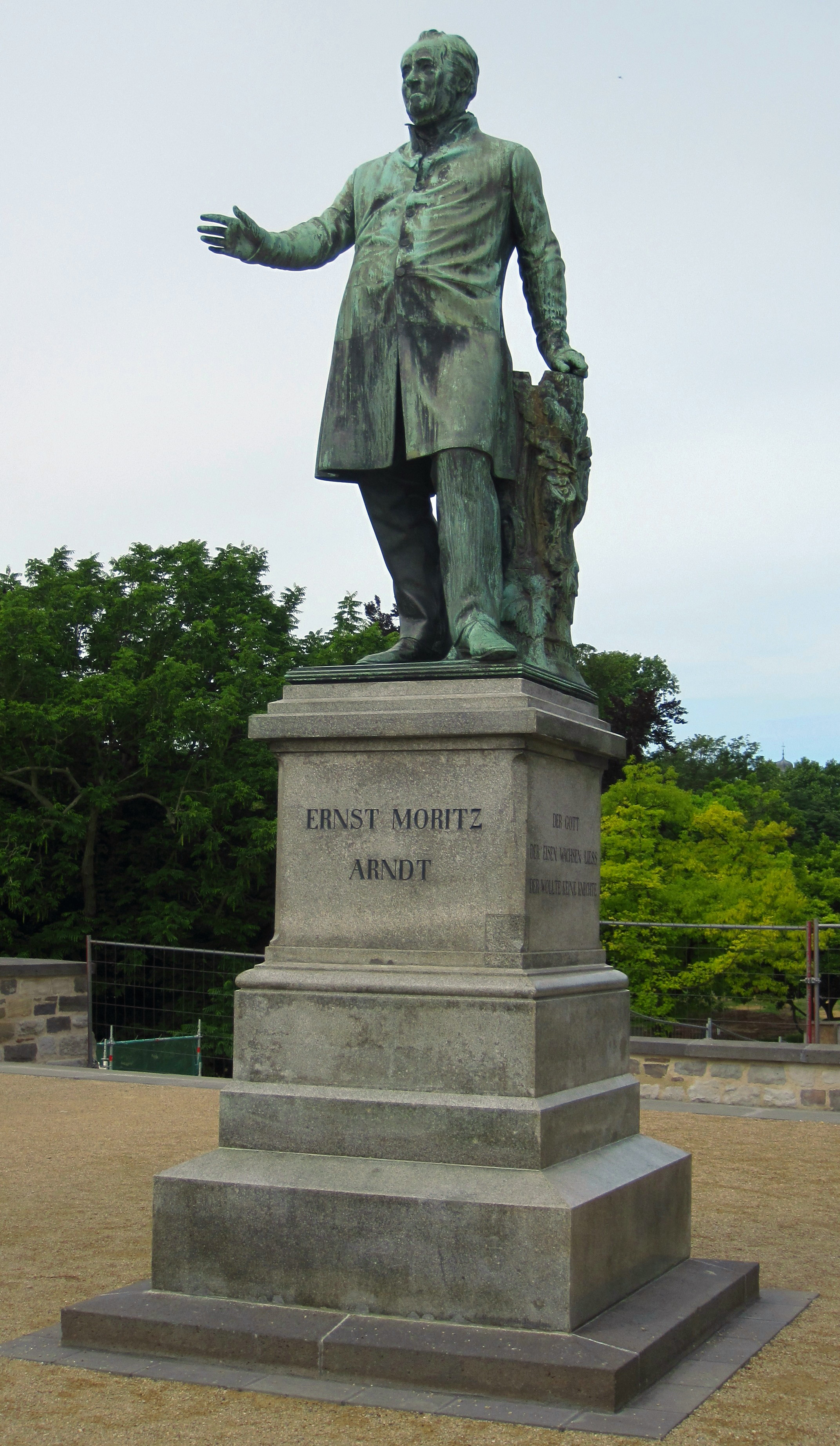 Ernst-Moritz-Arndt-Denkmal am Alten Zoll (Bonn)